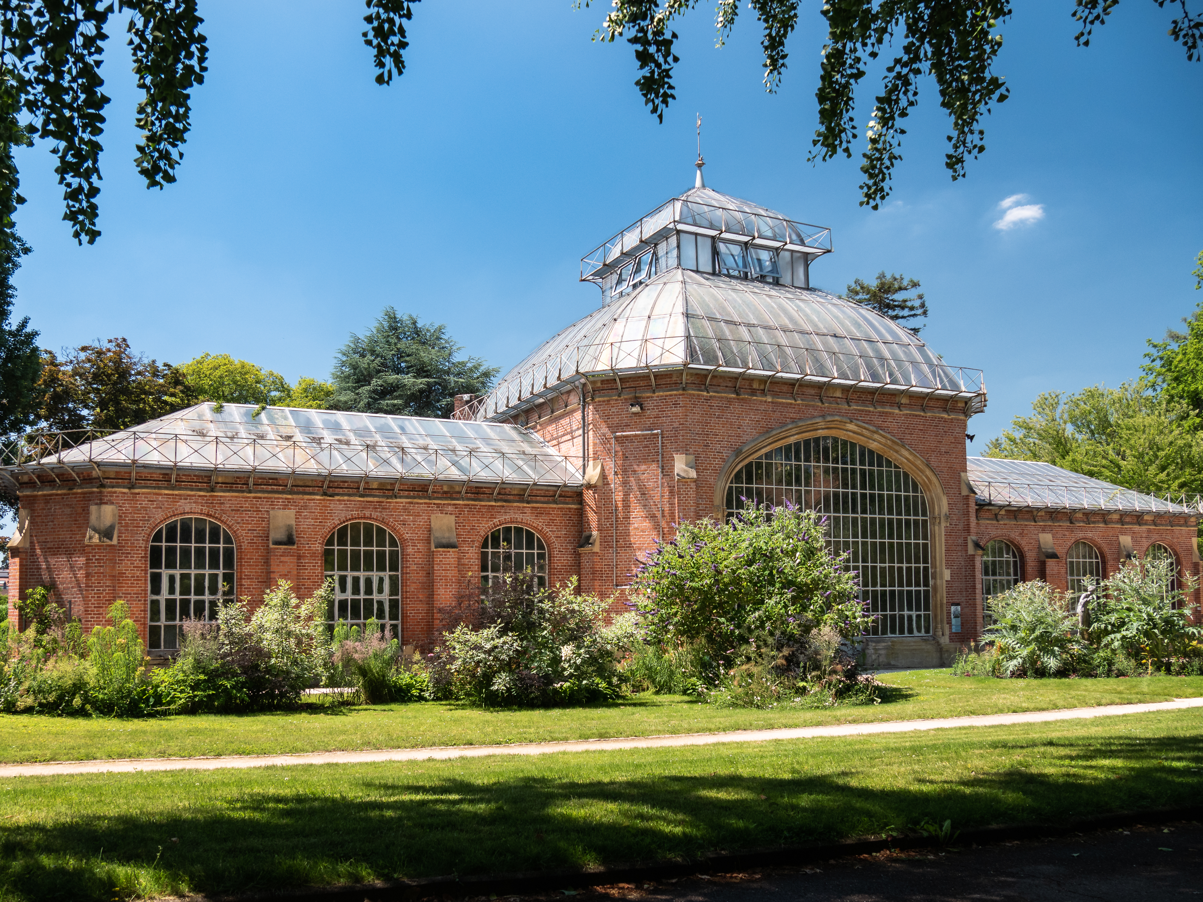 Serre du jardin botanique de Metz